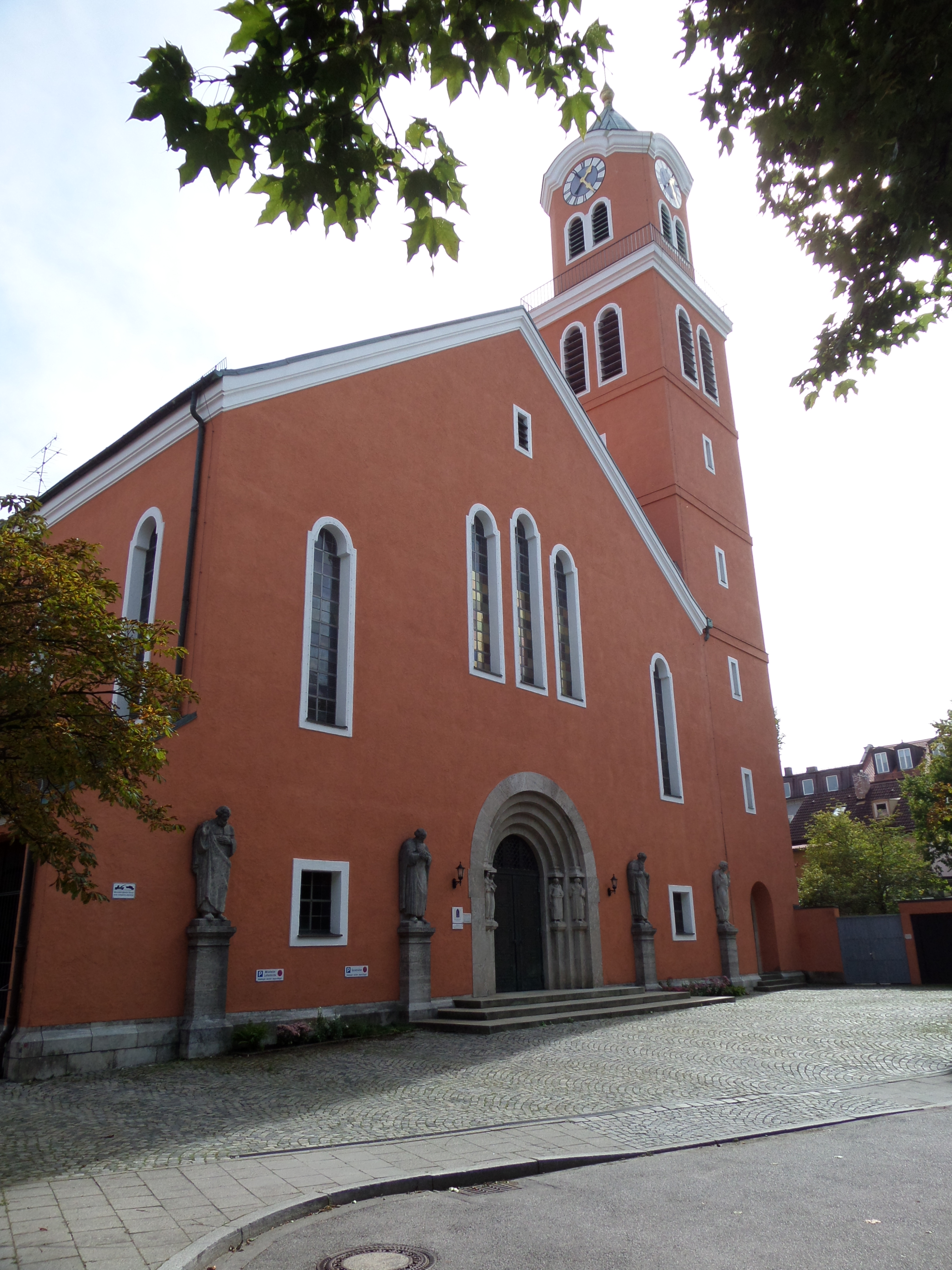 21.09.2013. _ München